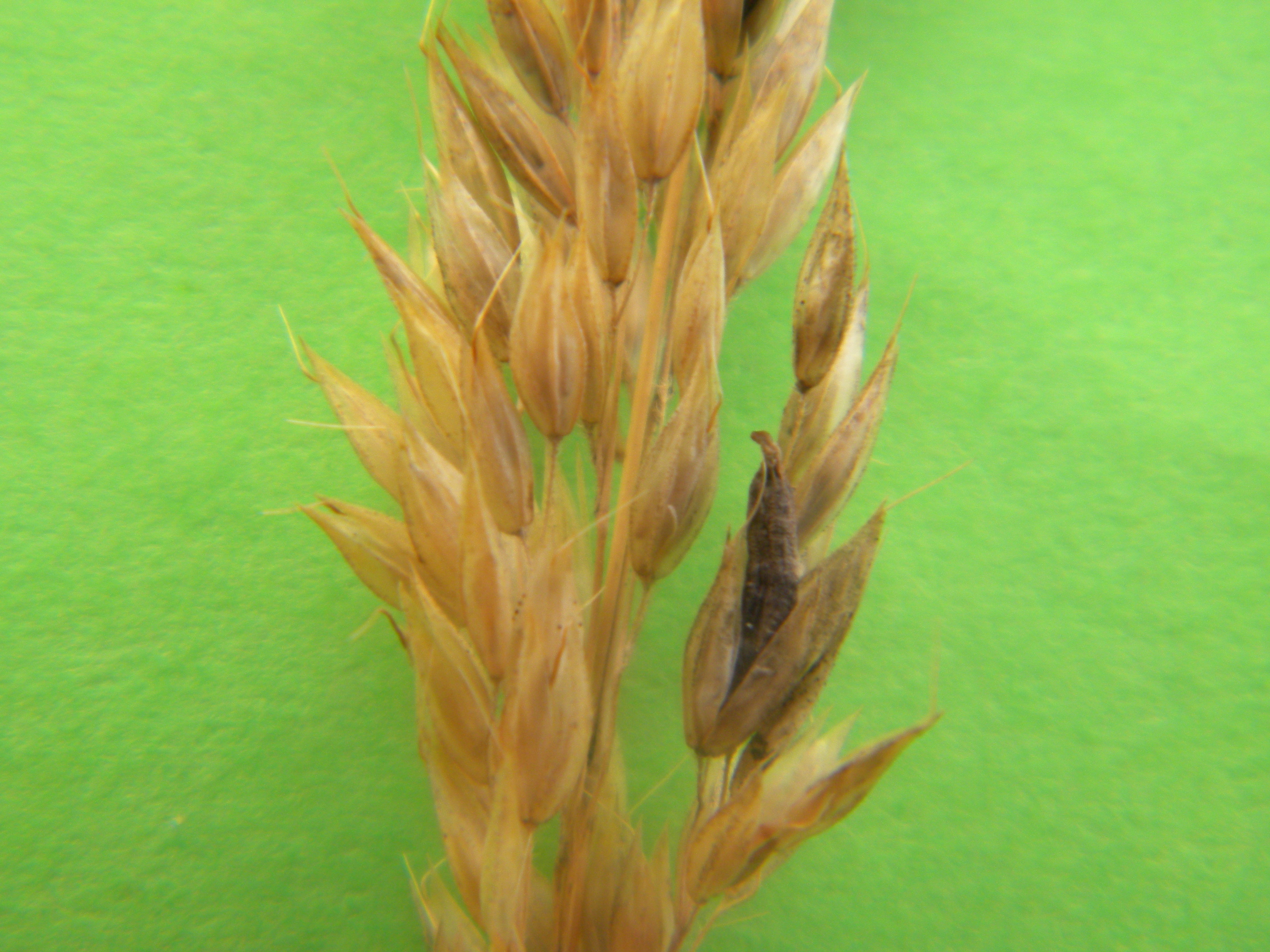 Holcus mollis kun Claviceps purpurea en Sambadel Francio